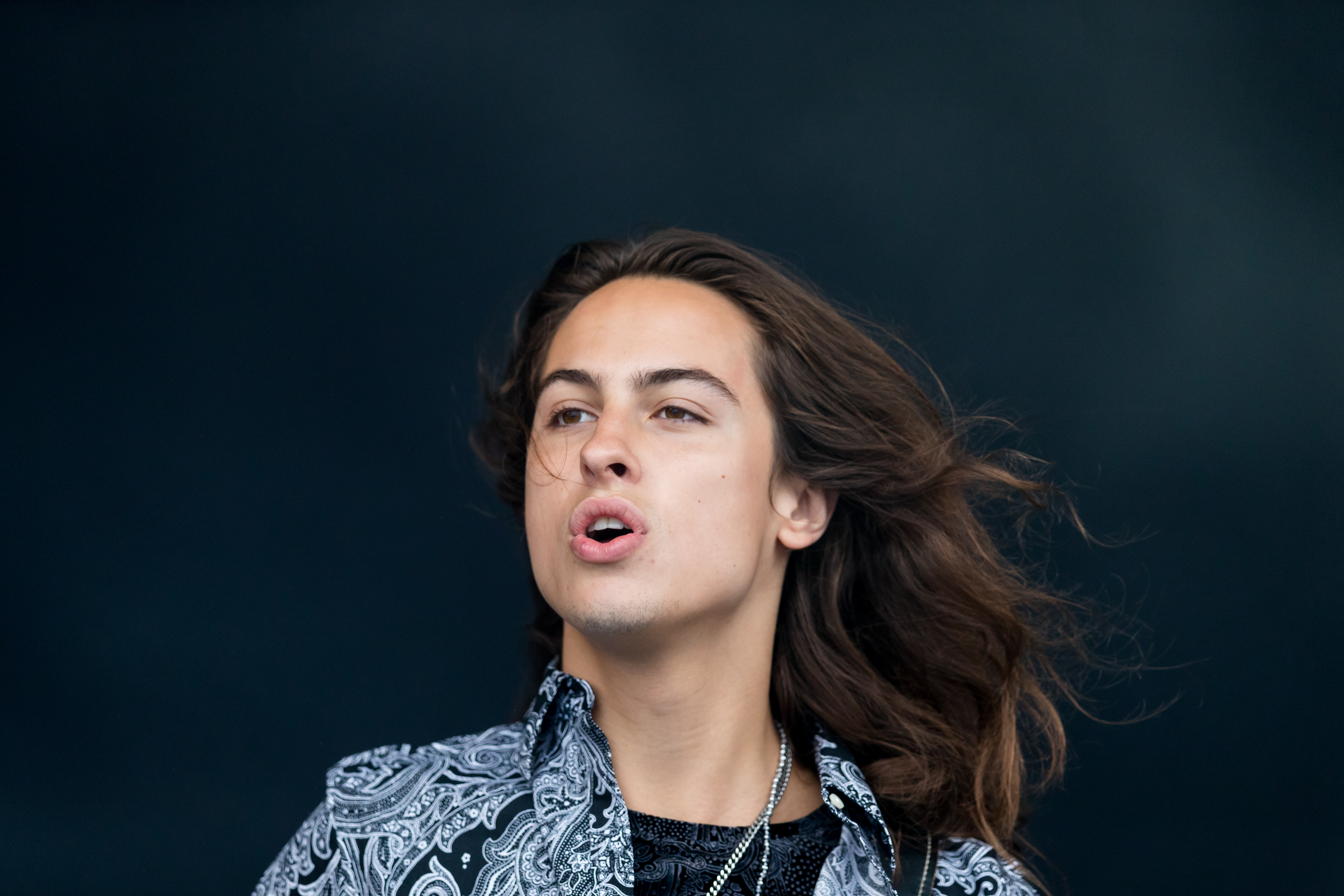 Greta van Fleet @ Rock am Ring 2018